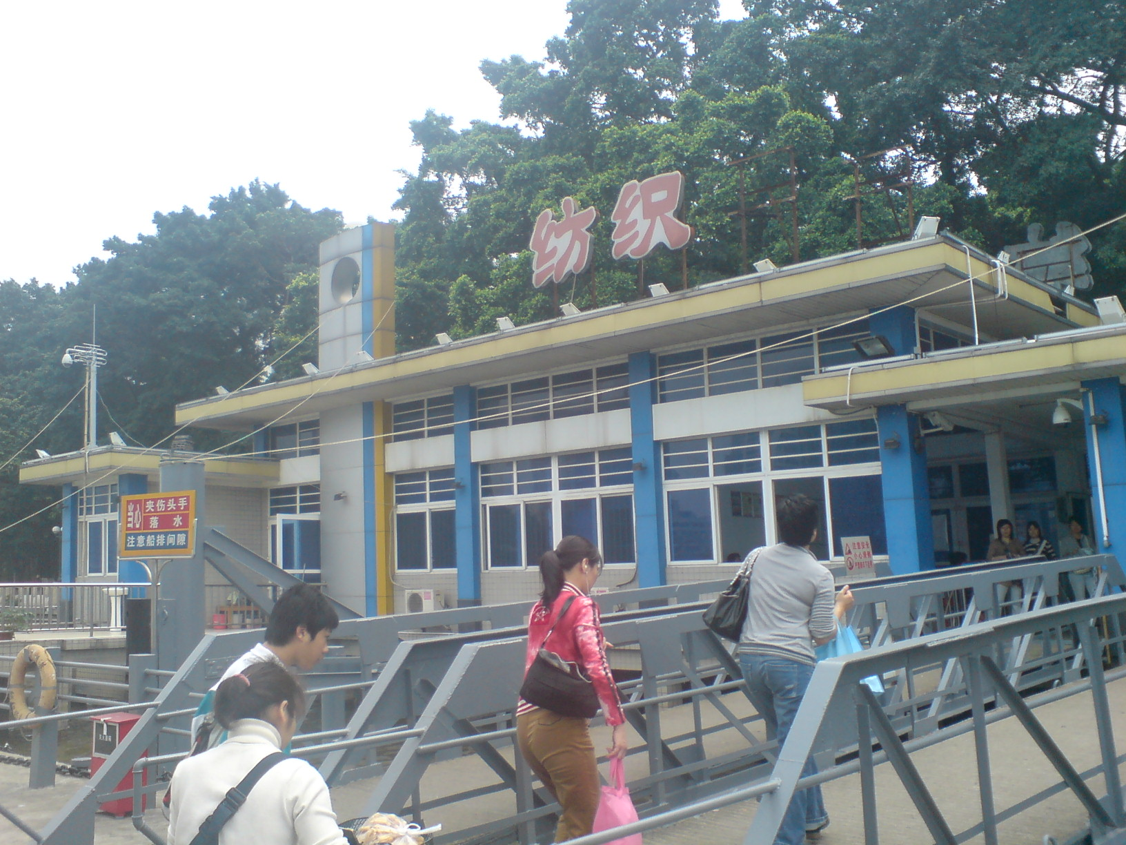 廣州紡織碼頭。